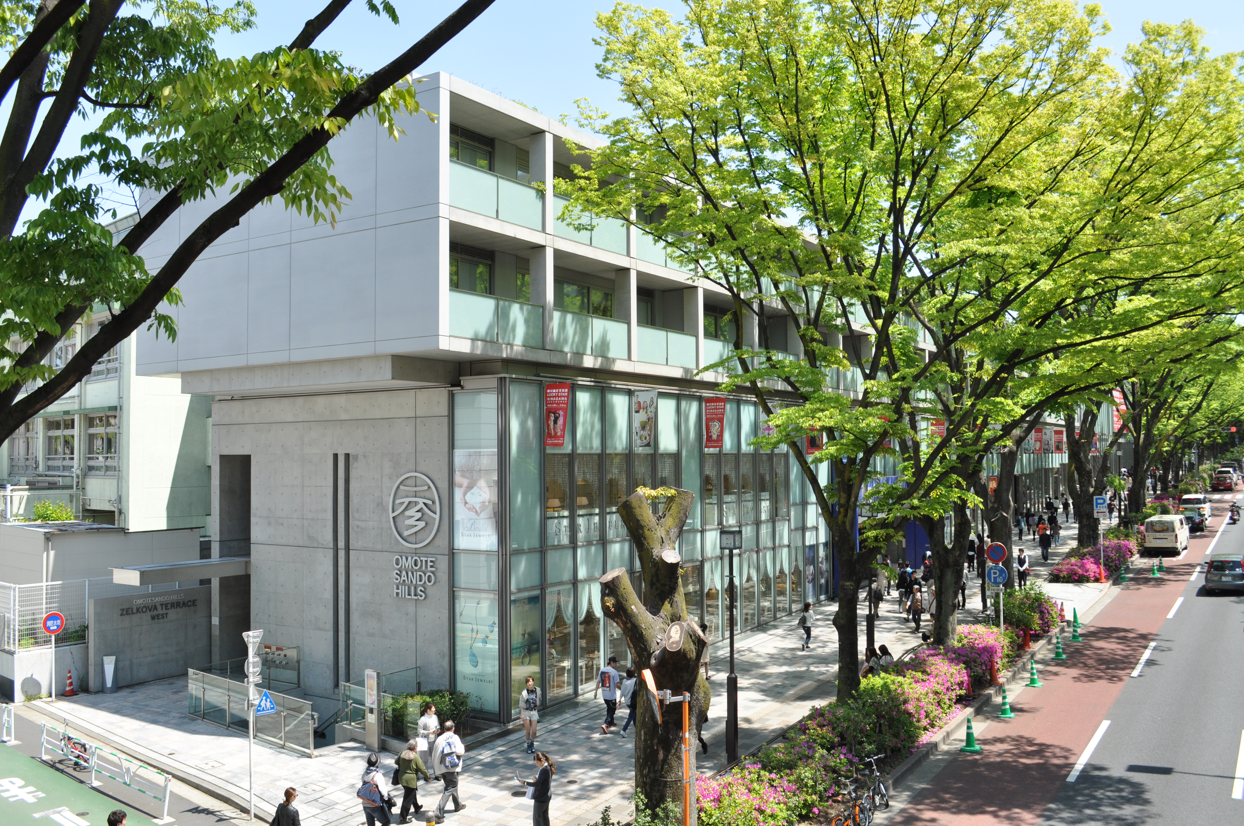 表参道ヒルズ周辺